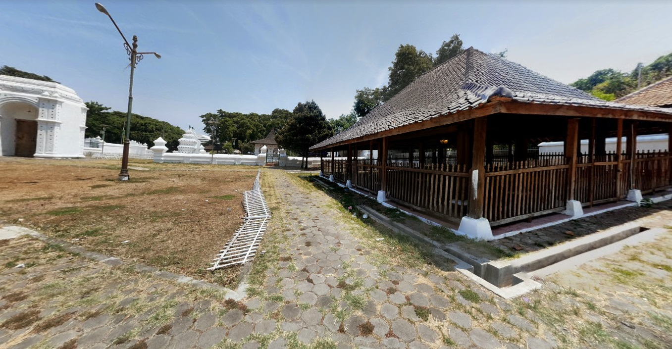 Bale Paseban kanoman